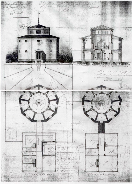 Luleå länsfängelse.